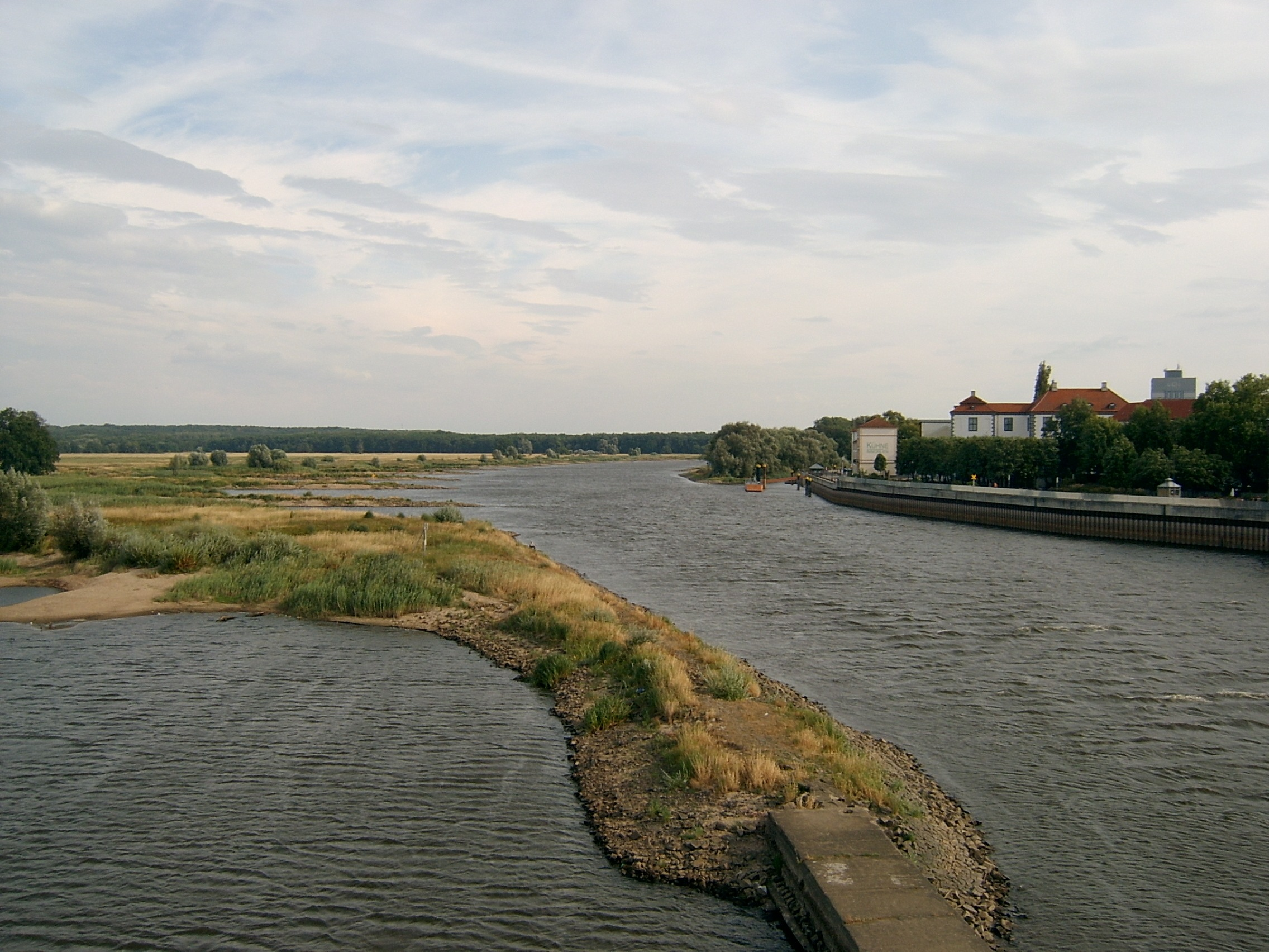 Blick auf die Oder von der Stadtbrücke zwischen Frankfurt (Oder) und Słubice in Richtung Süden.